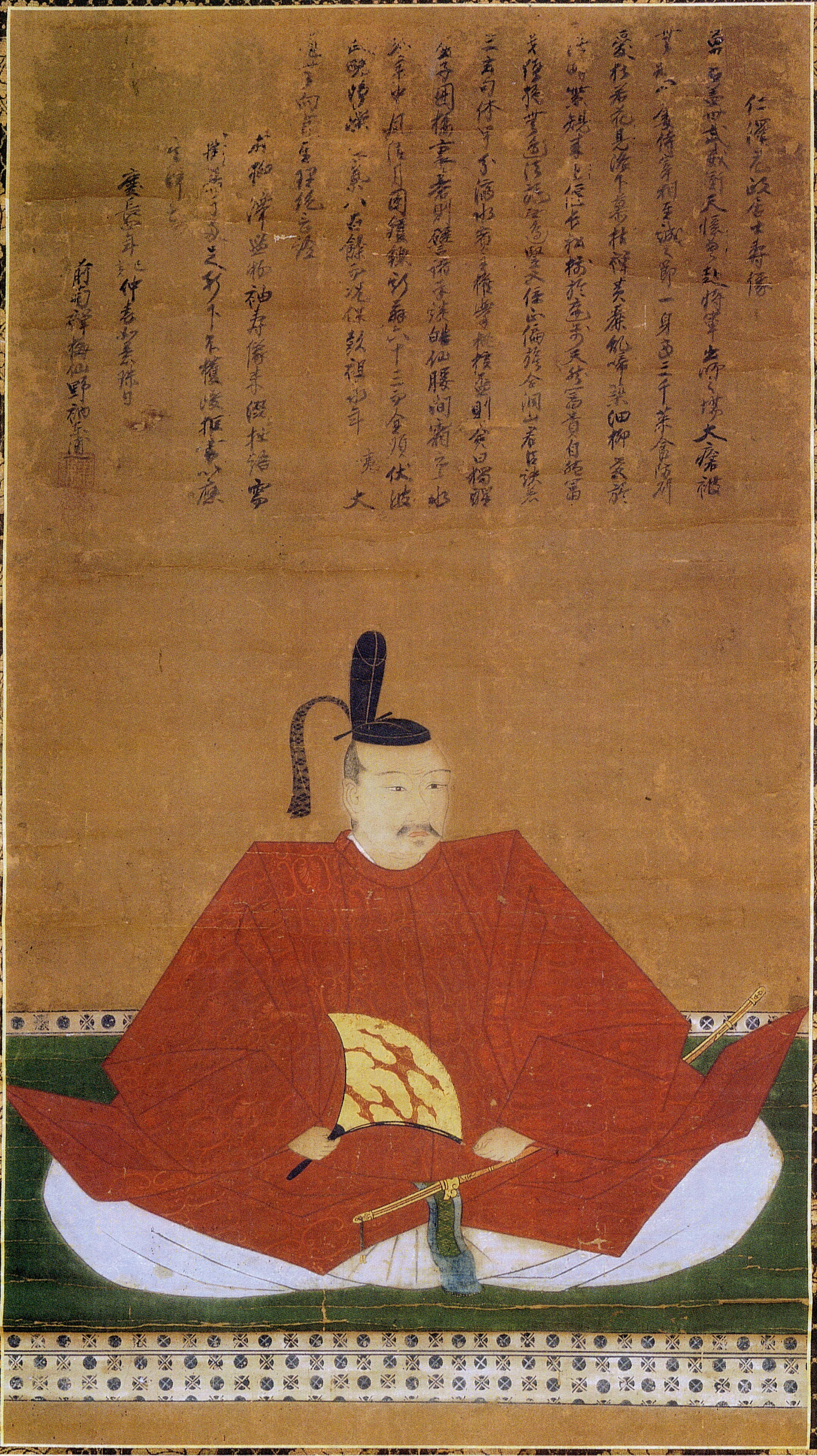 柳沢元政の肖像。